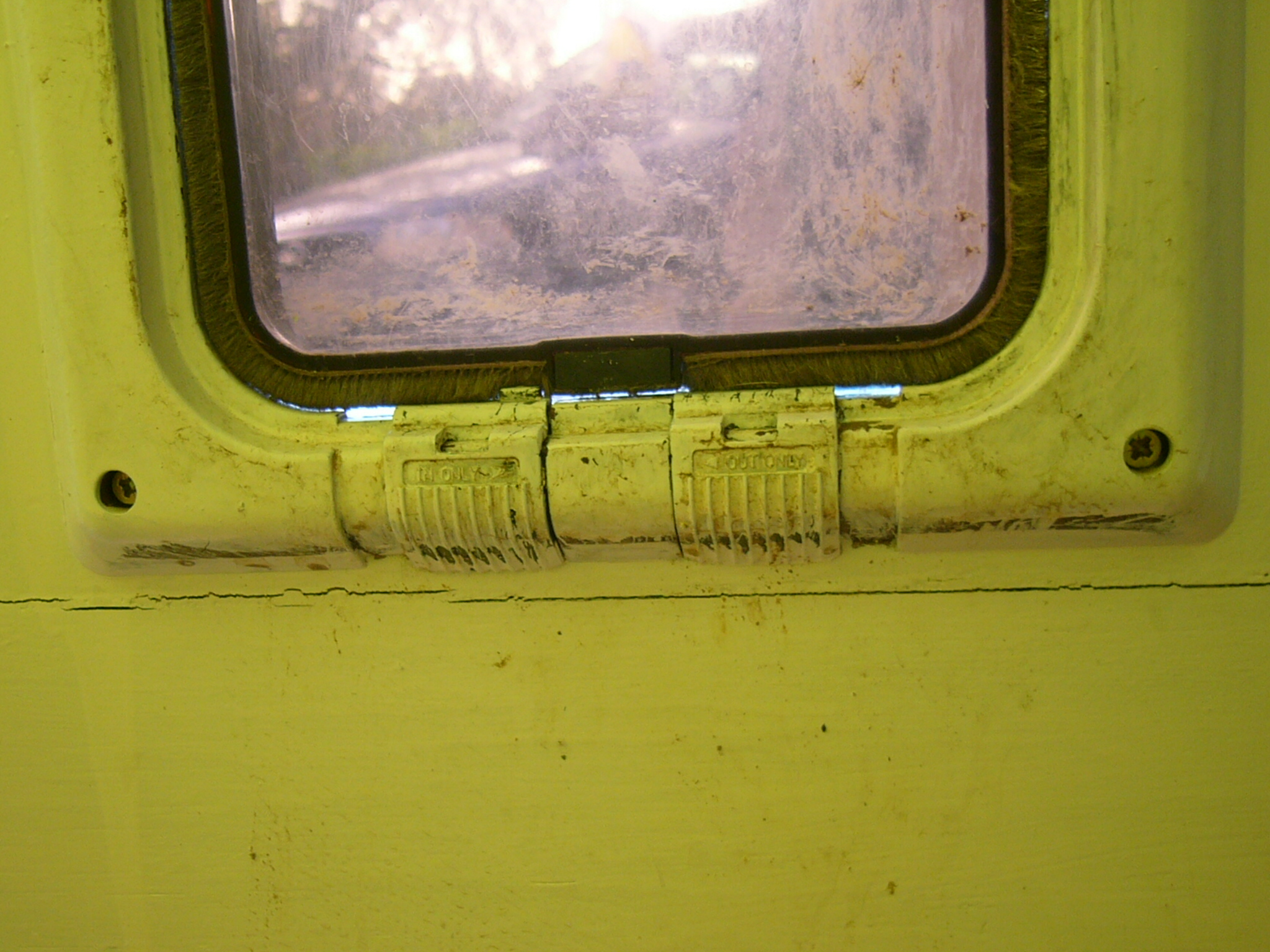 Katzenklappe (Detail der Schieber für die Verschlüsse - Richtungen)